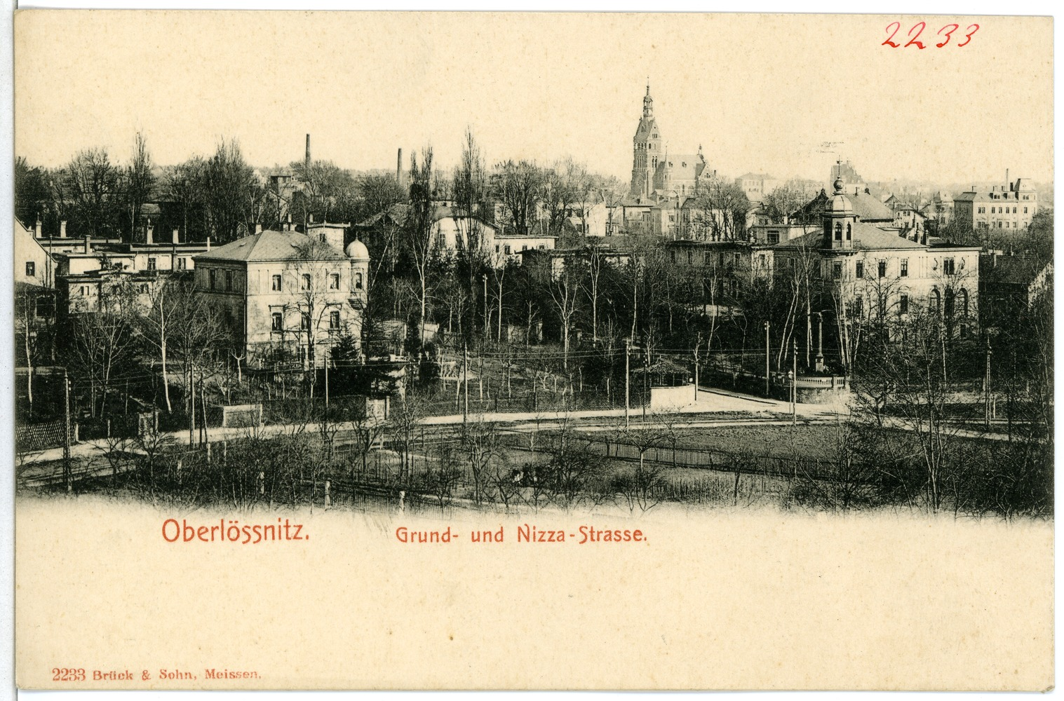 Oberlößnitz; Grund- und Nizzastraße This postcard is from publisher Brück & Sohn in Meißen ( postcard has a unique number 02233 and is available in a higher resolution at the publisher. This images was uploaded in a cooperation project between Wikipedians and the publisher.